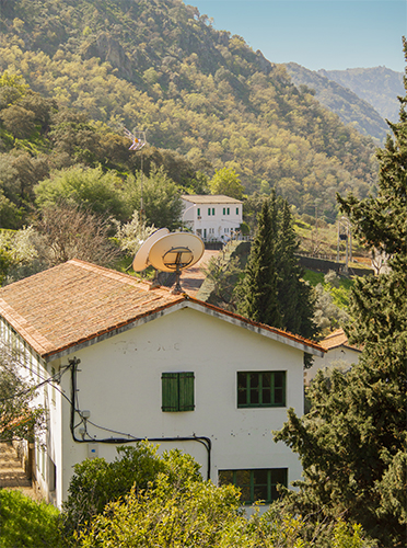 Casas del poblado del Salto de Aldeadávila, en la provincia de Salamanca, Castilla y León, España